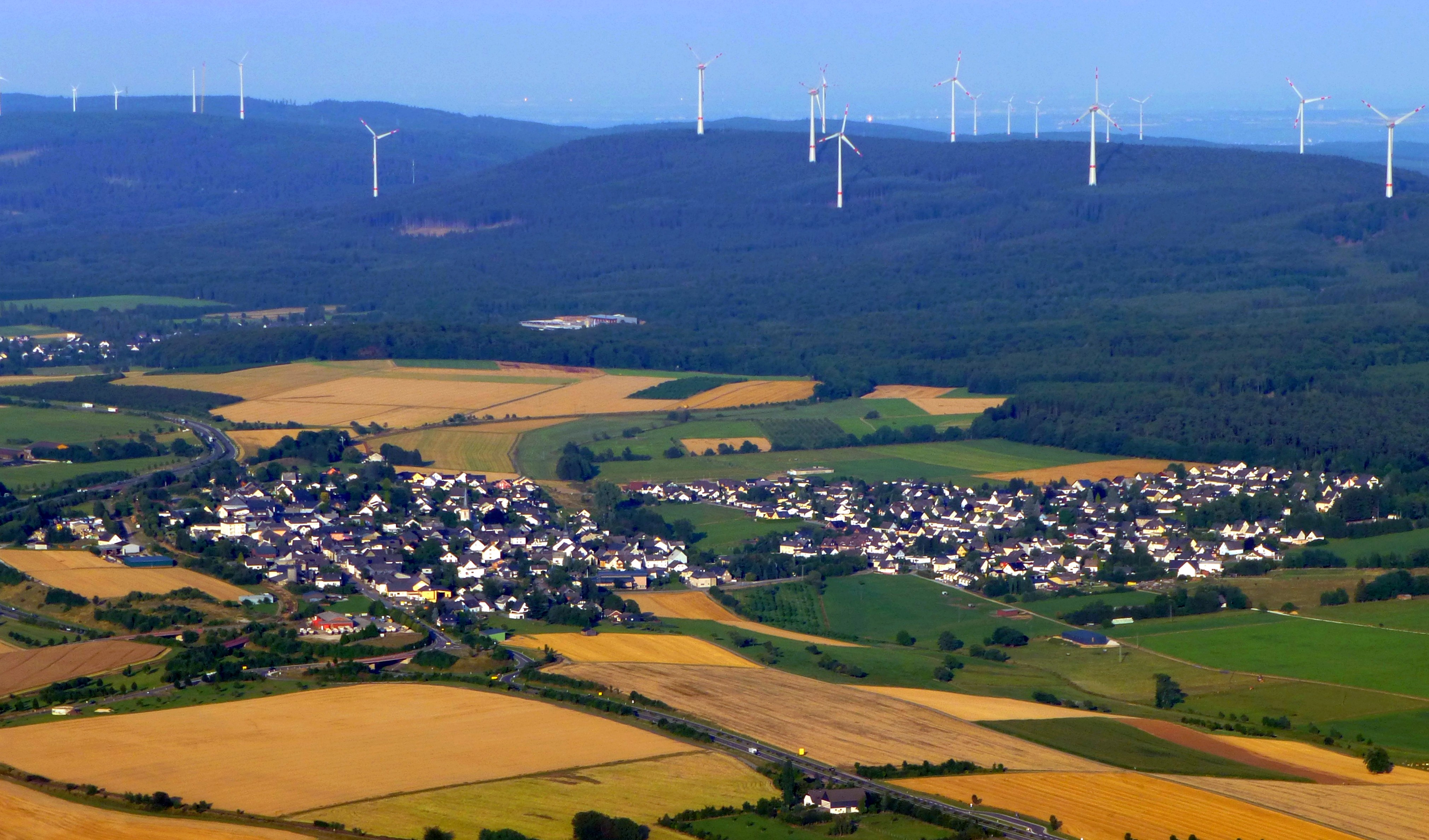 Argenthal